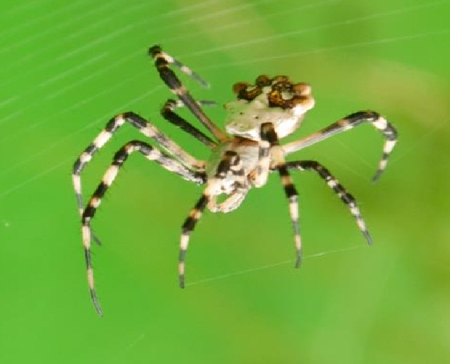 Araña Argiopea Picta